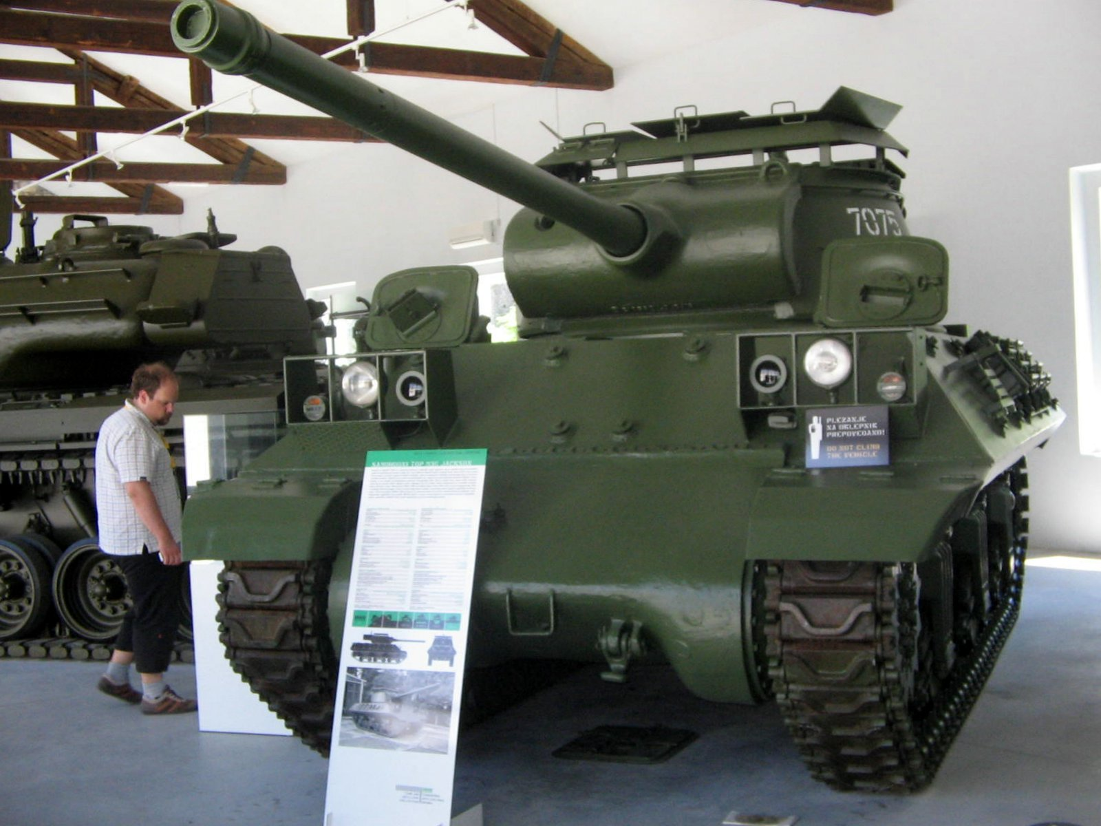 Park of Military History, Pivka, Slovenija